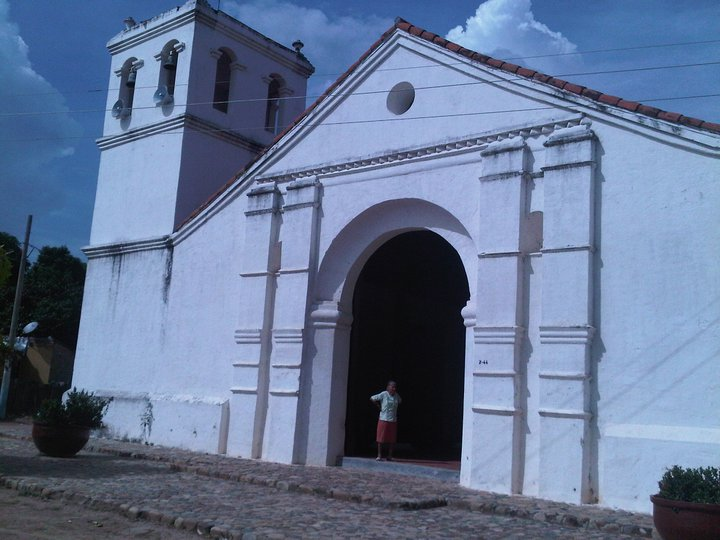 Capilla de Badillo. Capilla de San Antonio